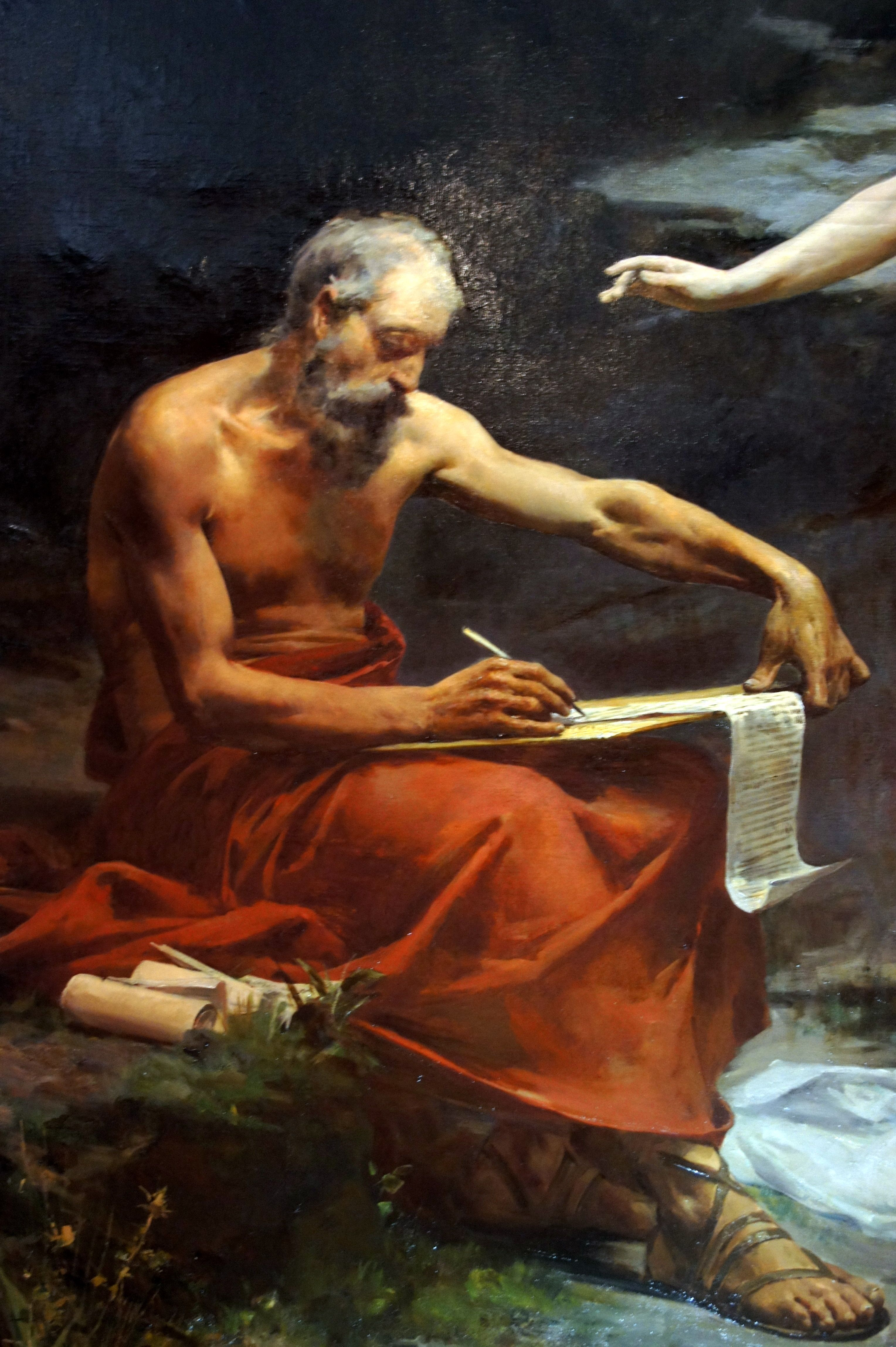 Detalle del cuadro "Ninfa Egeria dictando a numa Pompilio las letes de Roma".